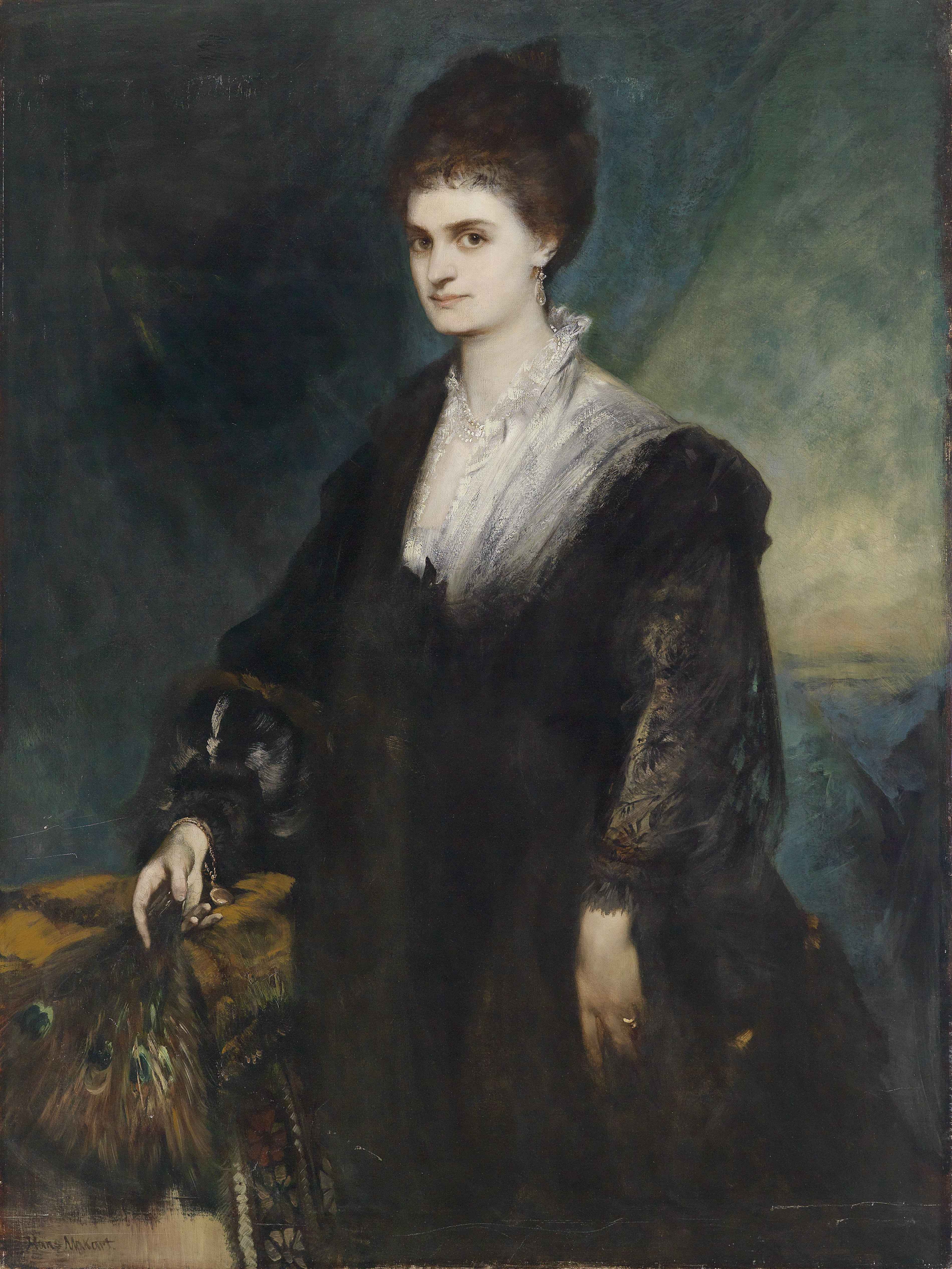 Bildnis Gräfin Marie von Coudenhove-Kalergi, geb. Kalergi (1840–1877)